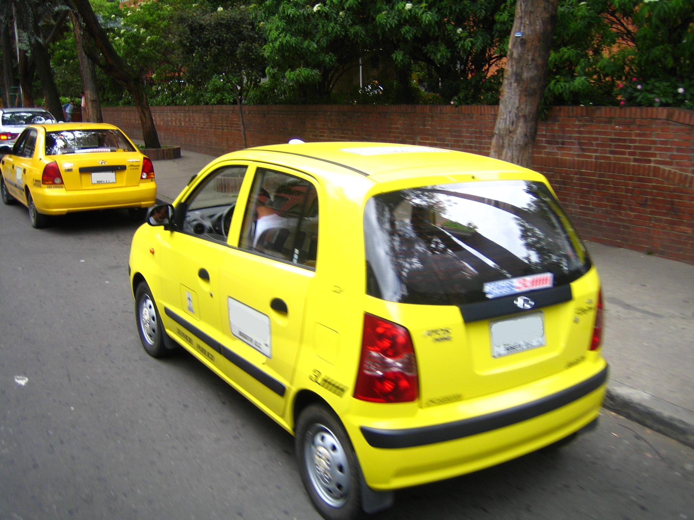 Taxi en Bogota